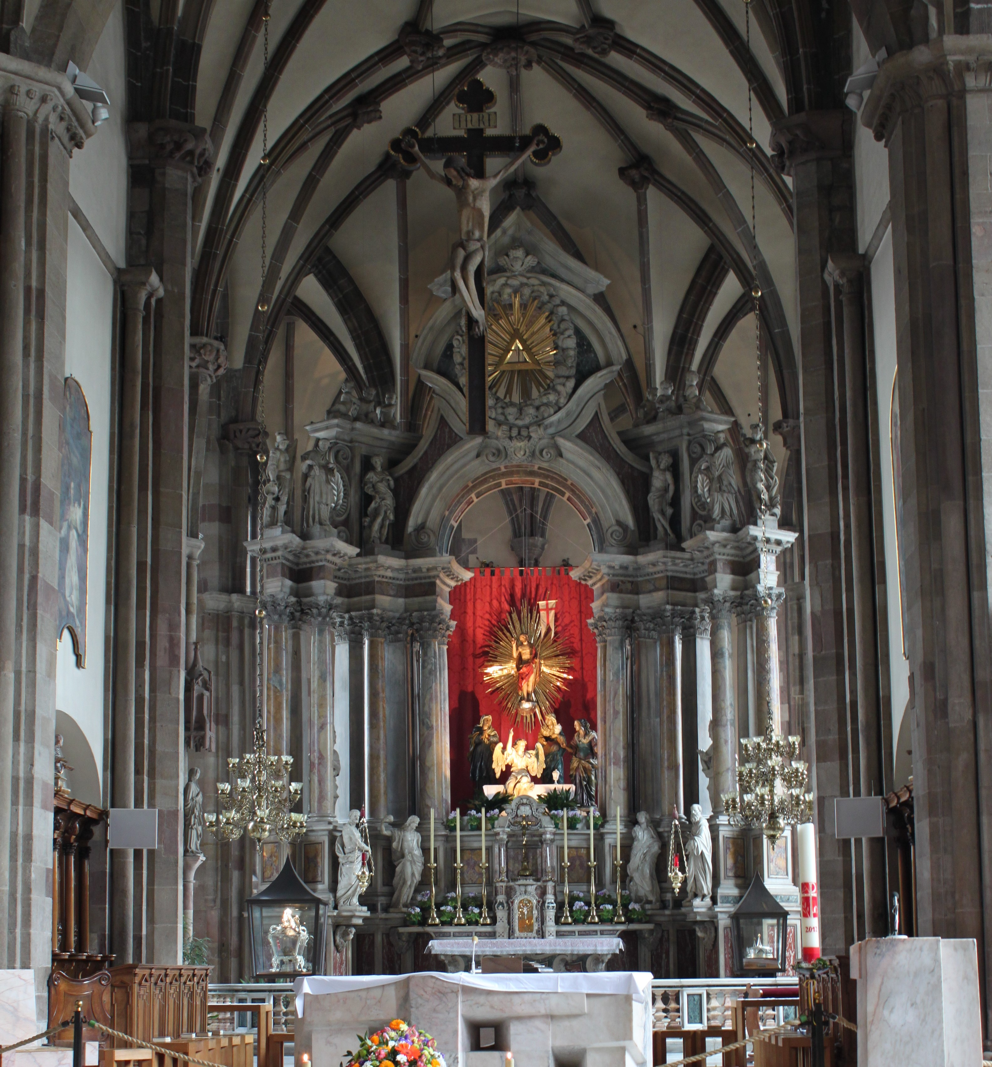 Altarraum der Pfarrkirche Maria Himmelfahrt in Bozen Südtirol